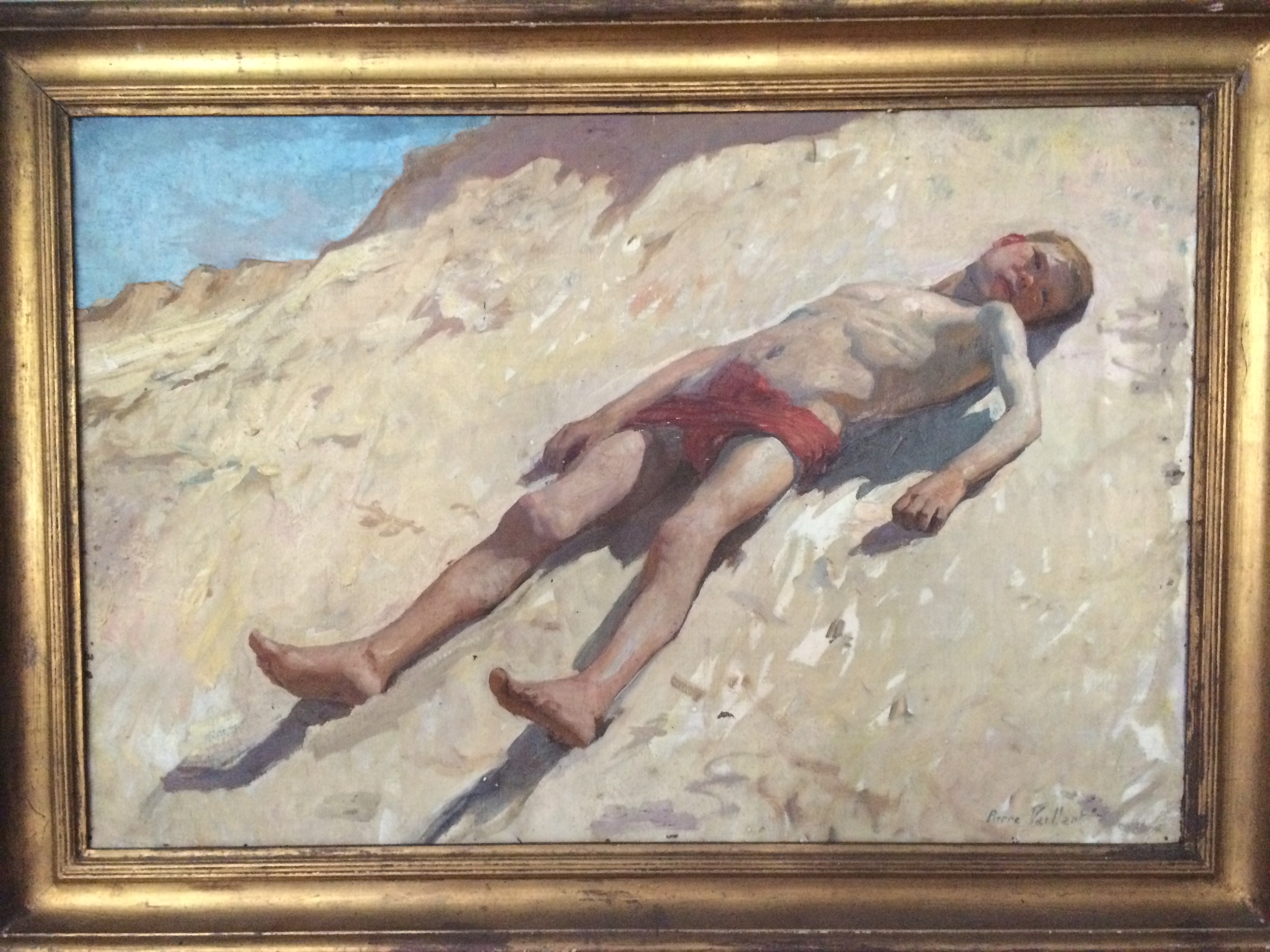 Le Baigneur au soleil - Salon des indépendants